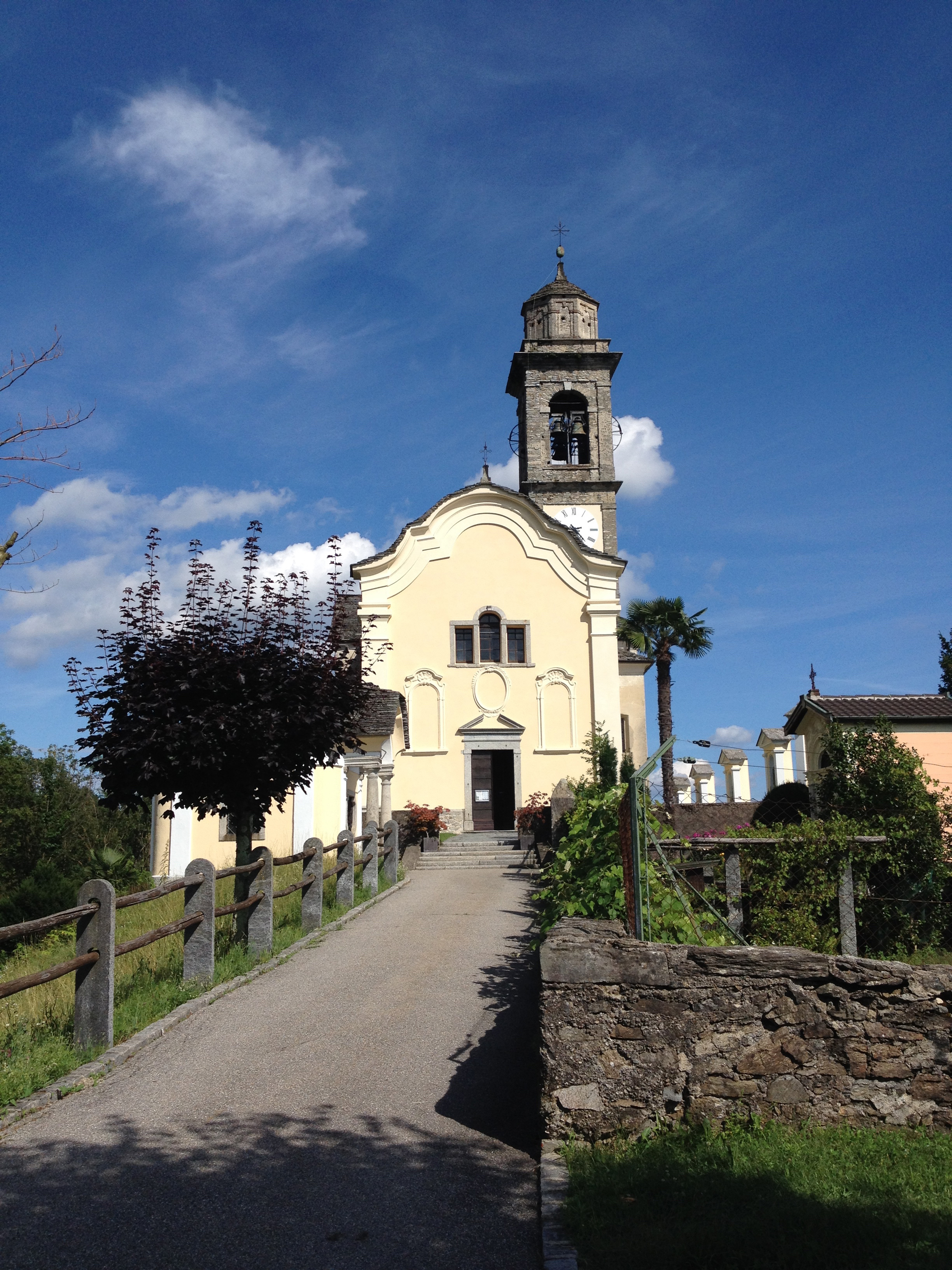 Aussenansicht der Pfarrkirche San Pietro in Astano